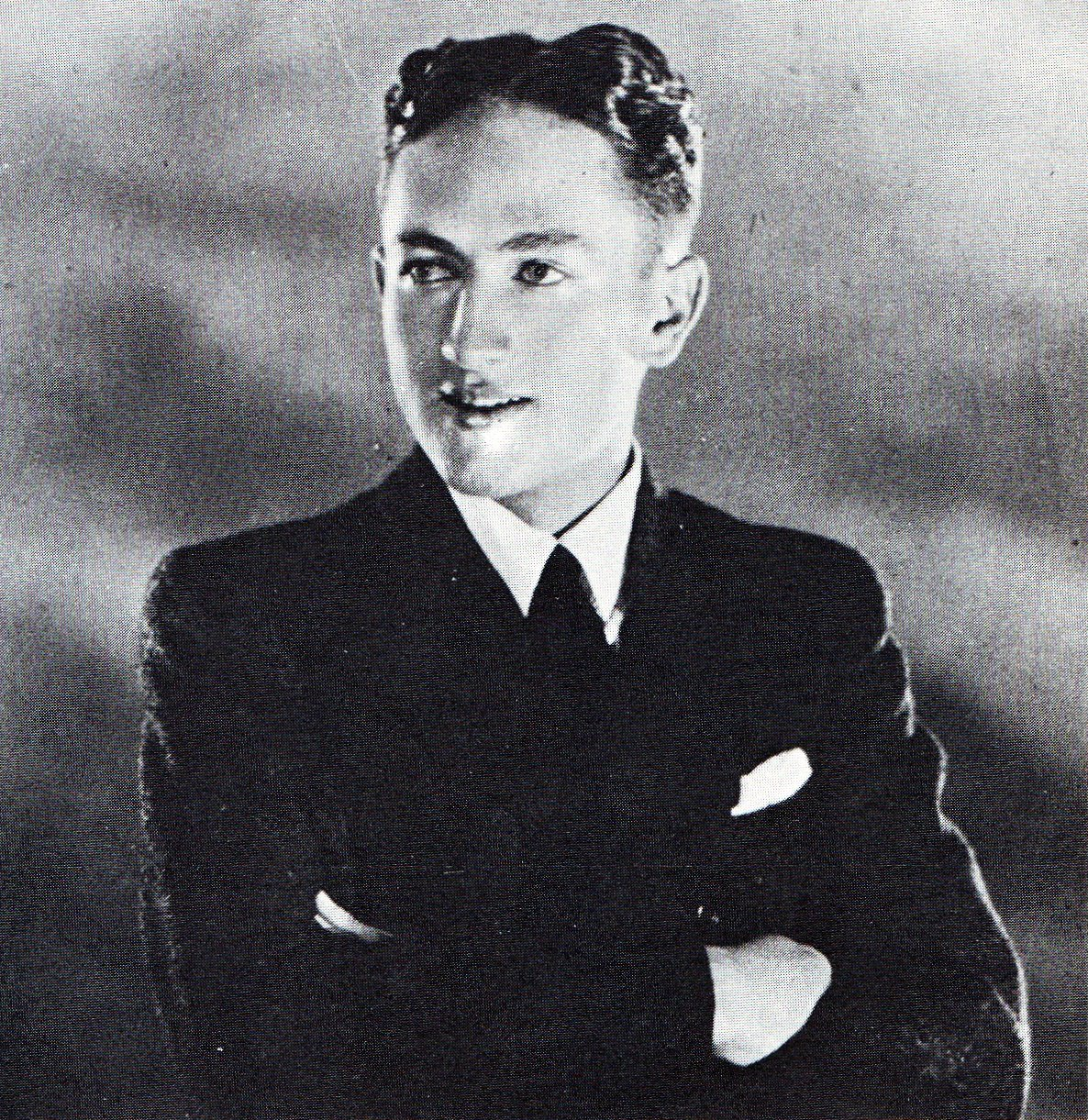 Siegfried Mynhardt as jongeling - toe hy by Anna Wensma-Klaasen aangesluit het om in Napoleon se Wasvrou ('n verwerking van Rostand se Madame Sans-Gene) op te tree in 1930.